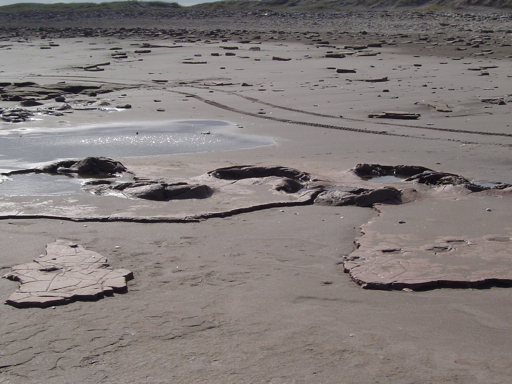 Huellas Prehistoricas en la playa de Pehuen-Có